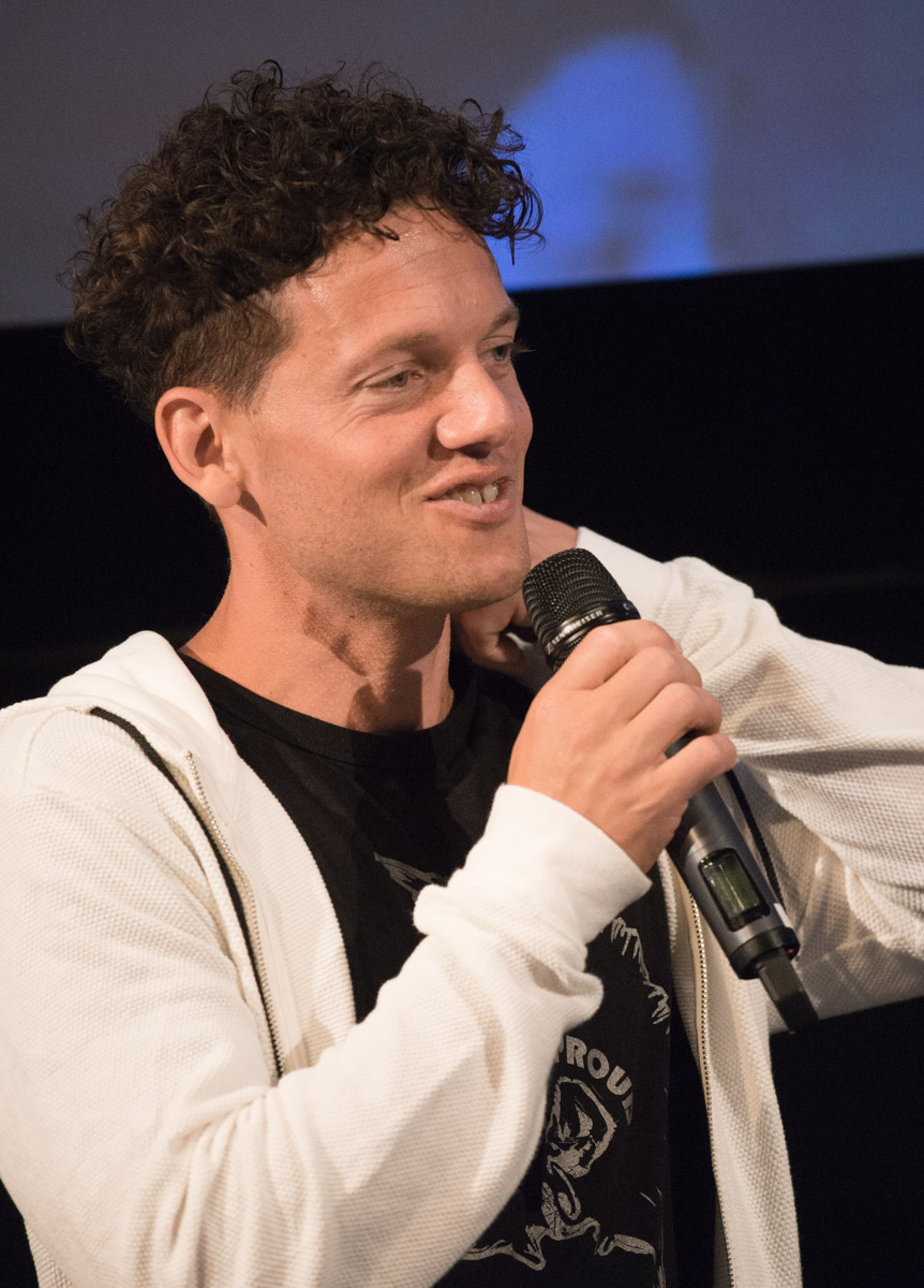 Nassim Al Fakir under presentationen av den Svenska filmhösten i Filmhuset i Stockholm den 17 augusti 2015.